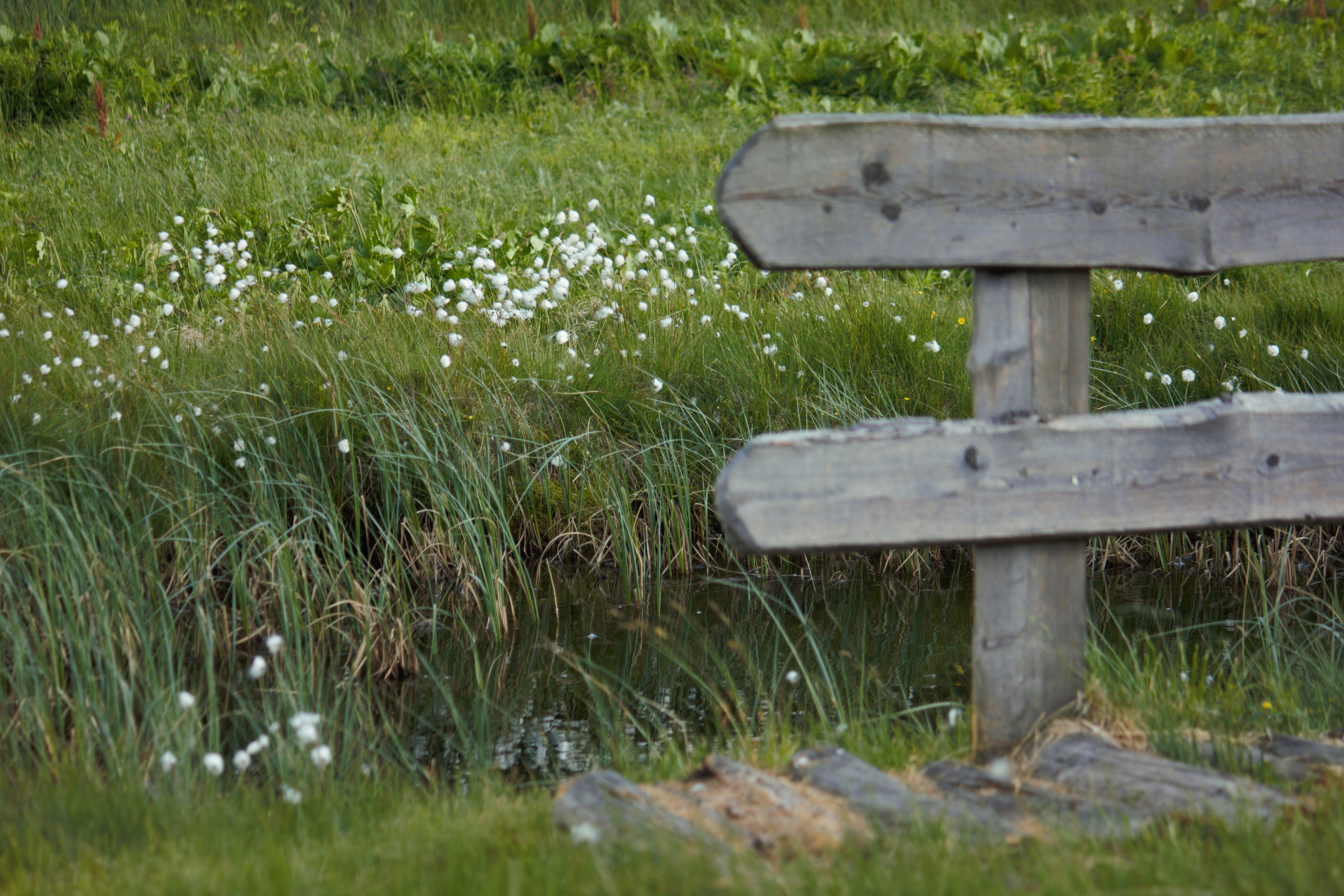 Torbiera del Tonale (Q47816793)